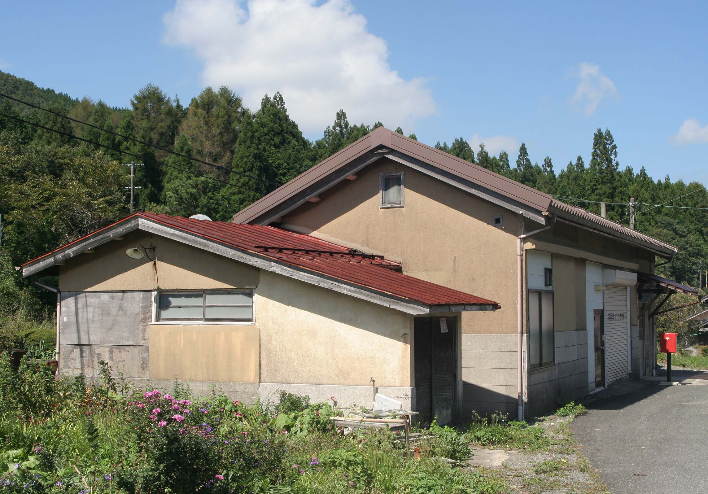 西日本旅客鉄道 芸備線 道後山駅の駅舎